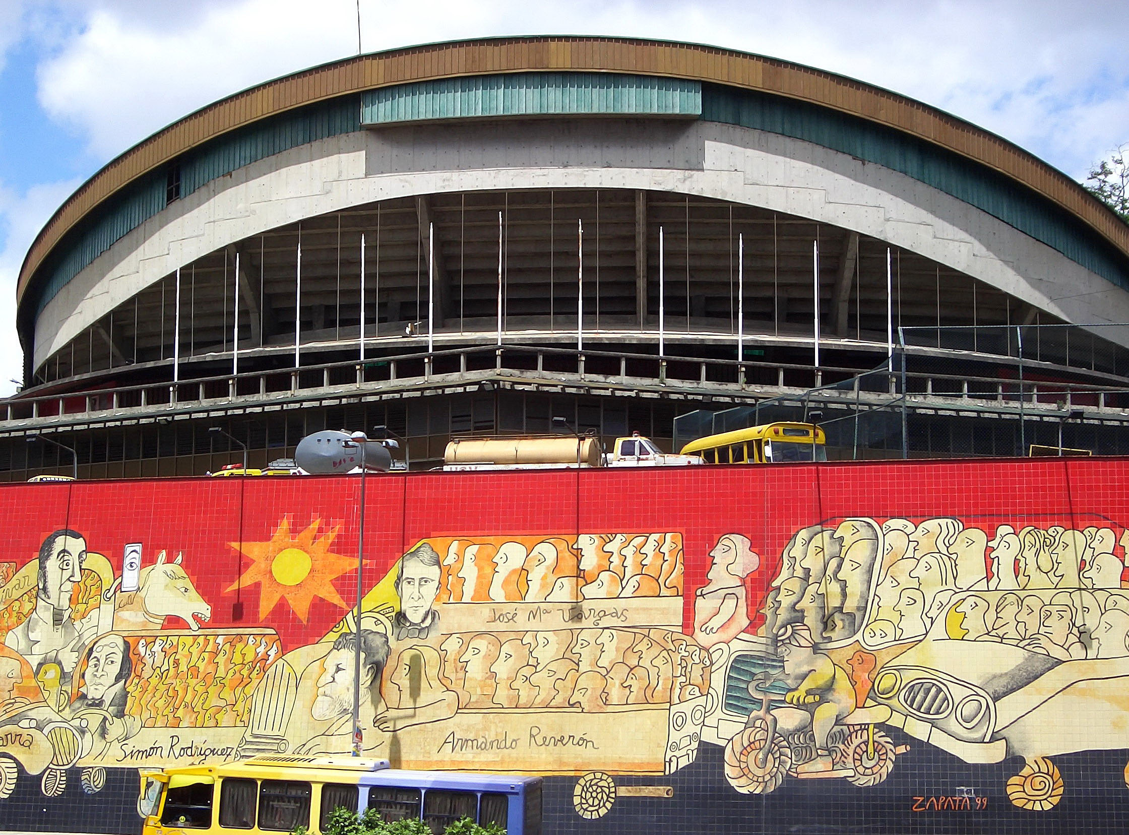 La cachucha es el gimnasio múltiple de la Universidad Central de Venezuela. Abajo se aprecia una sección del mural "conductores de venezuela" del prolífico artista Pedro león Zapata del cual podrás obtener más información en los siguientes links